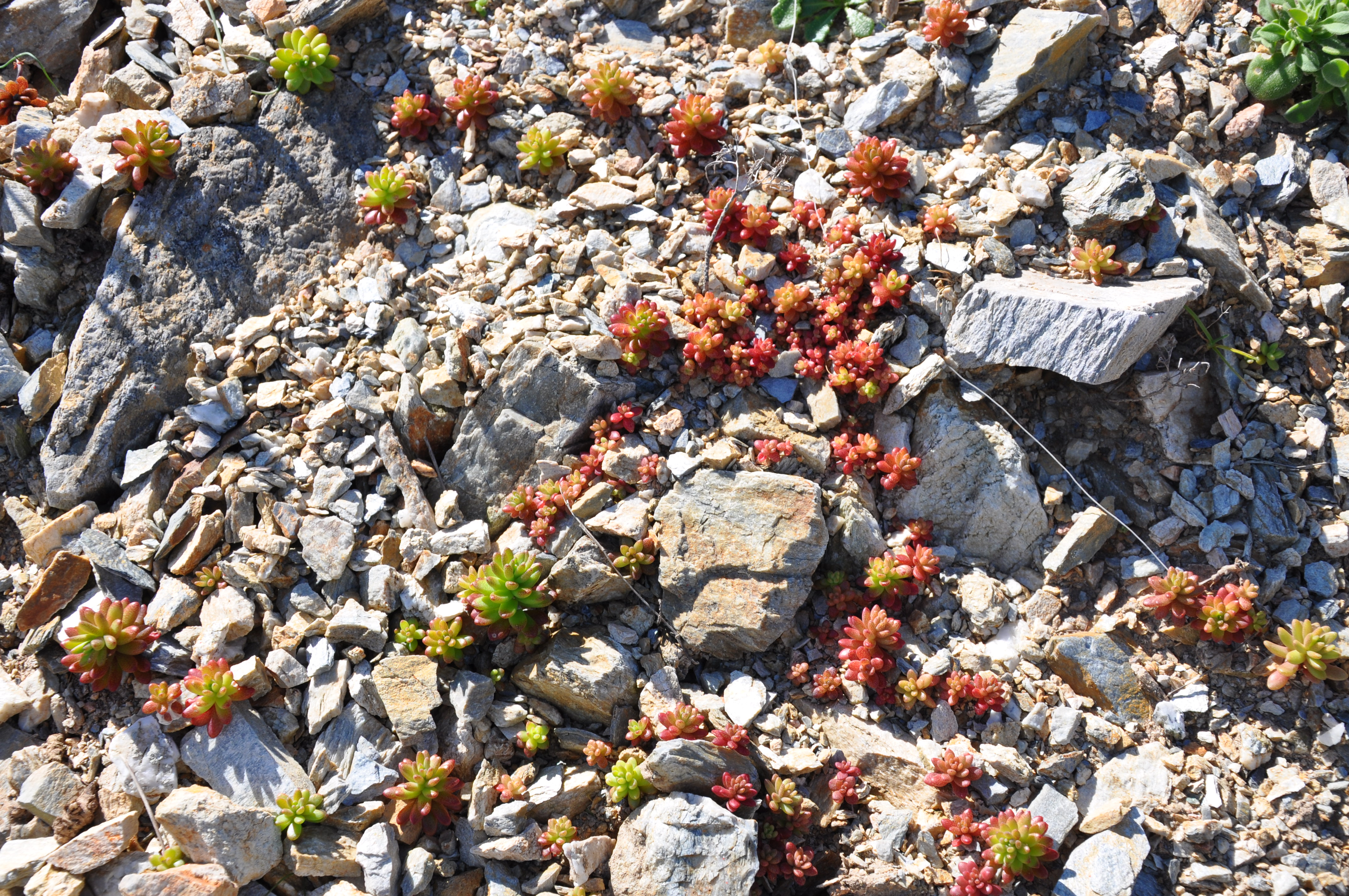 (Pistorinia sp). Ceuta, España.